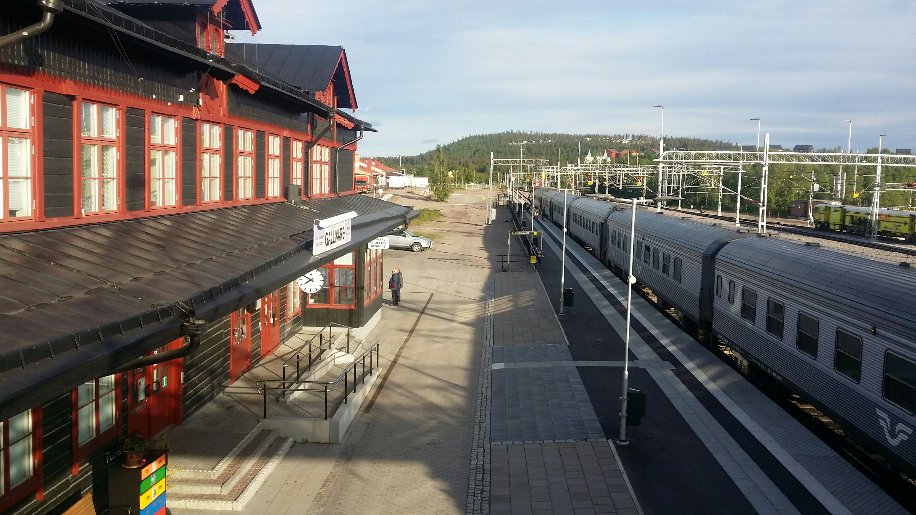 Gällivare stasjon med tog Narvik-Stockholm.